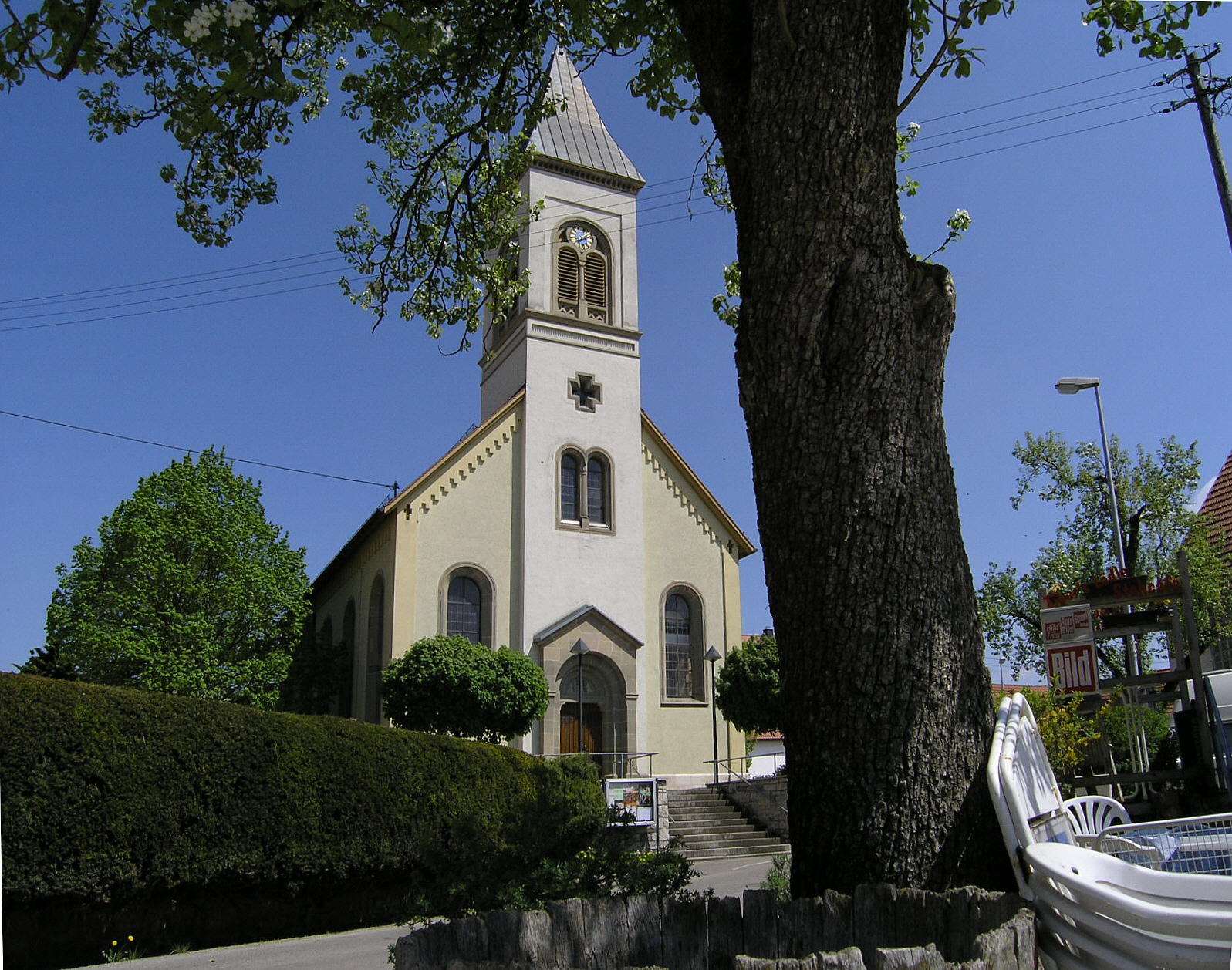 Bollingen. Kirche zum Heiligen Stephanus Date: 11 May 2006